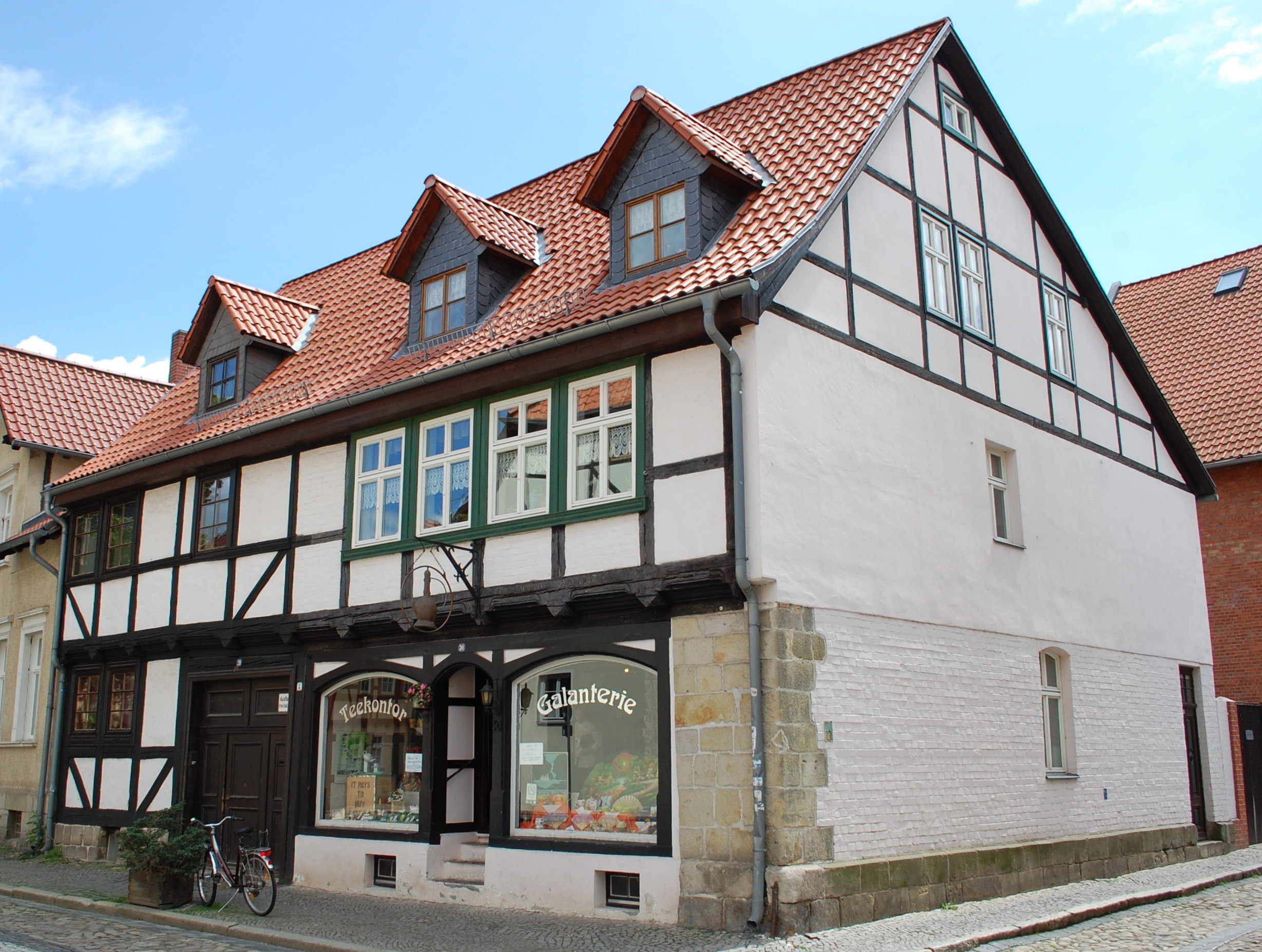 Haus in der Kaiserstraße in Quedlinburg